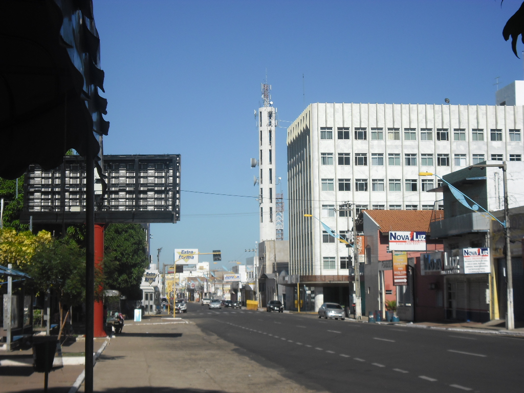 imperatriz ma